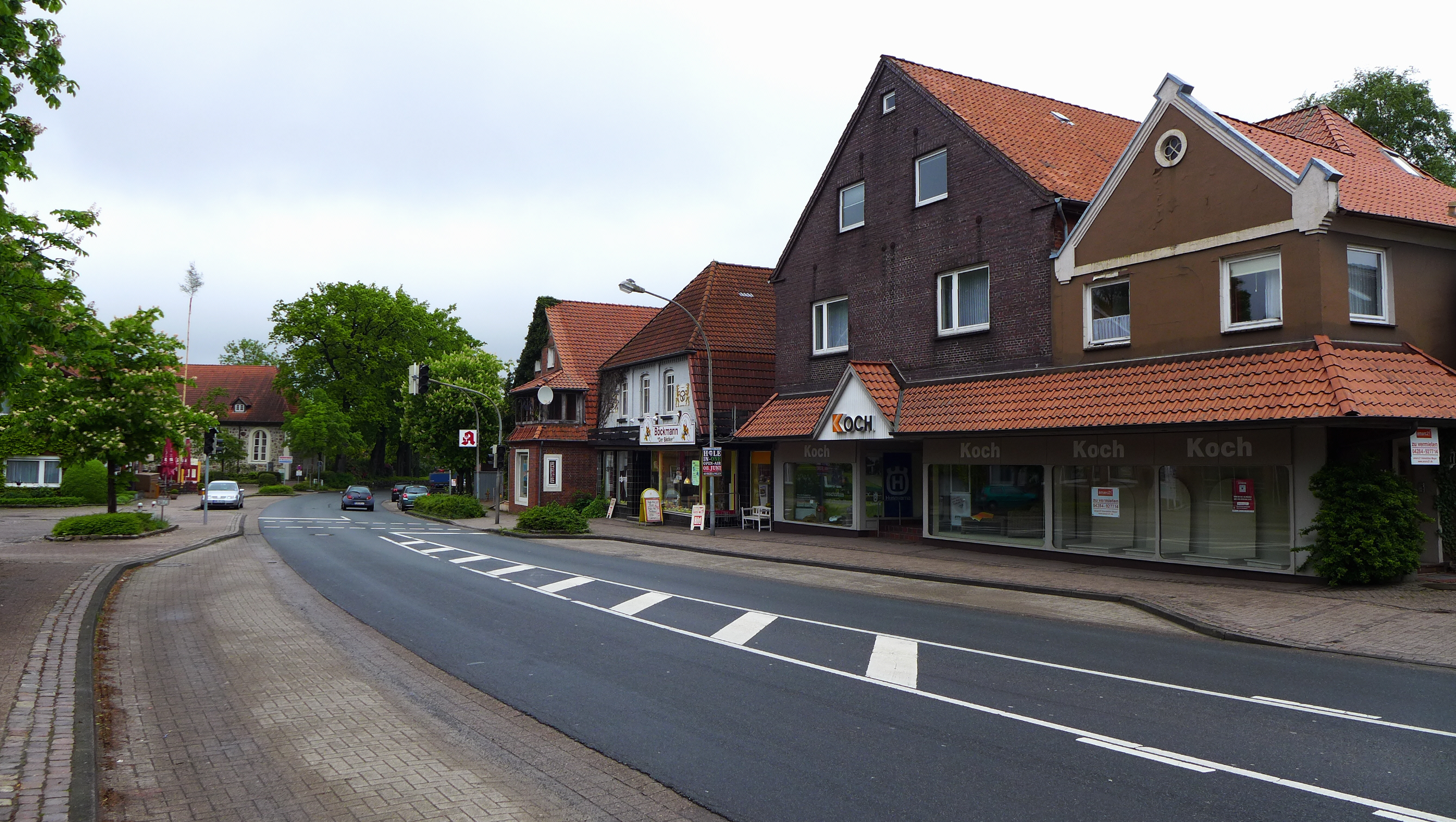 Hauptstraße in Selsingen, Landkreis Rotenburg (Wümme), Niedersachsen, DE.